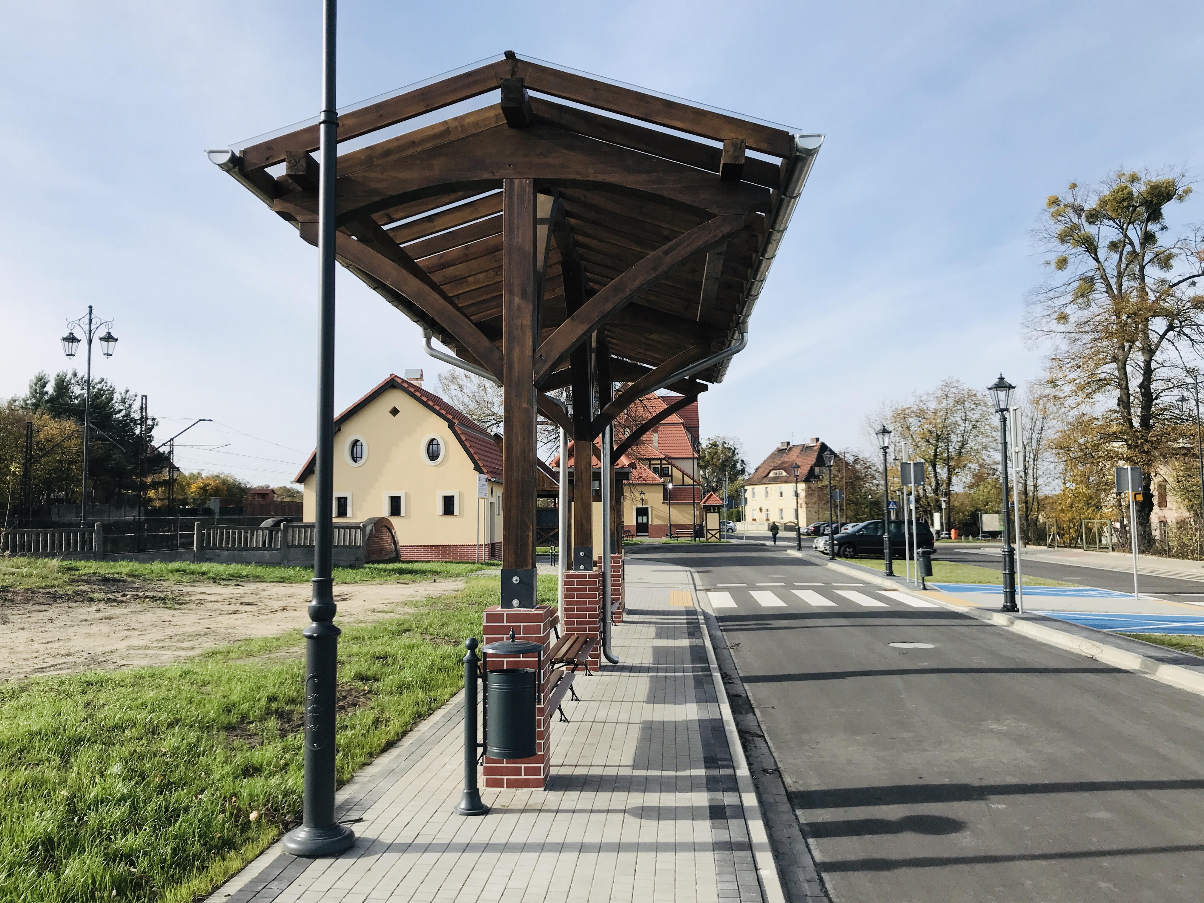 Dworzec autobusowy w Twardogórze. Zdjęcie wykonane po rewitalizacji.